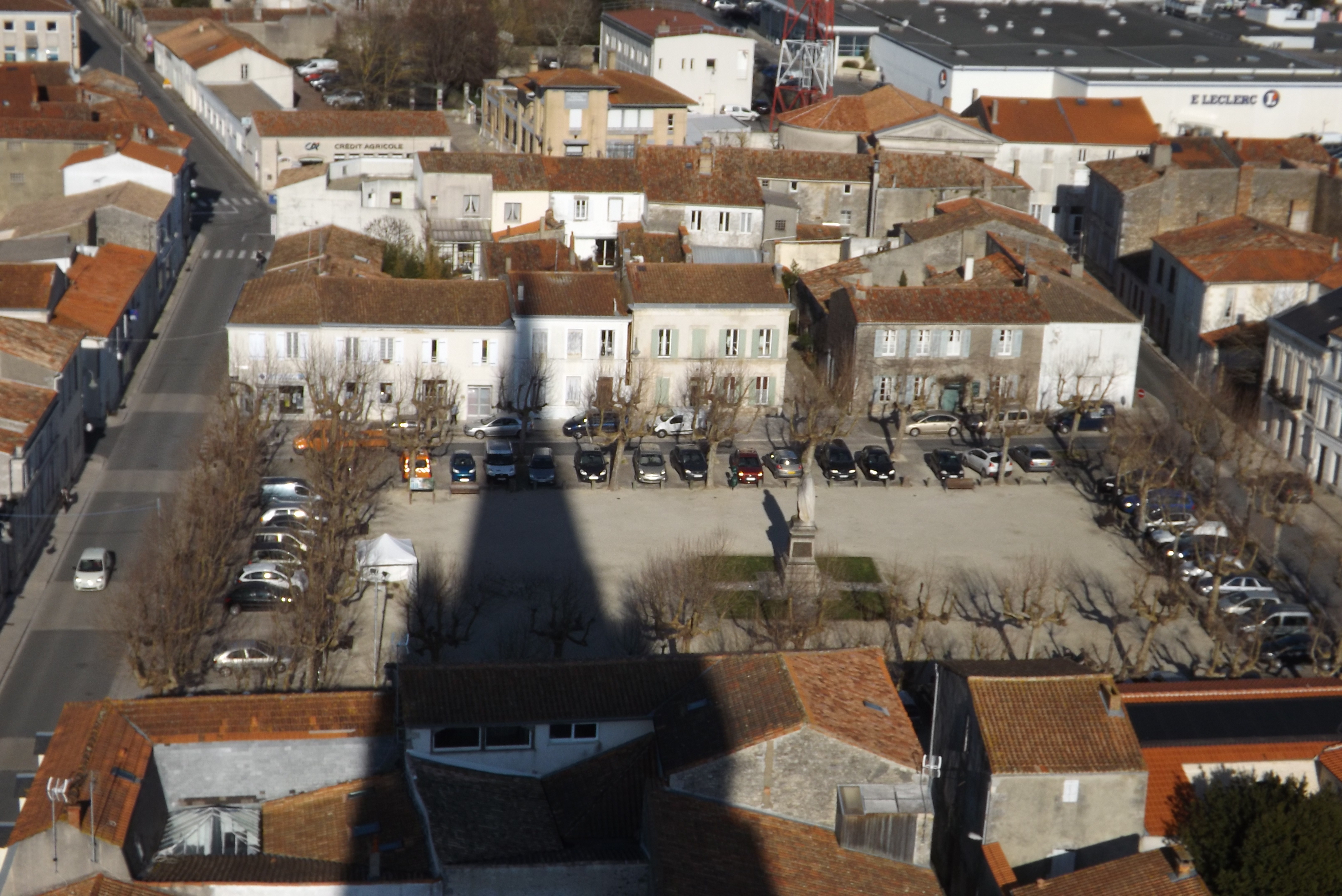 La place Chasseloup-Laubat vue depuis le clocher de l'église de Marennes.